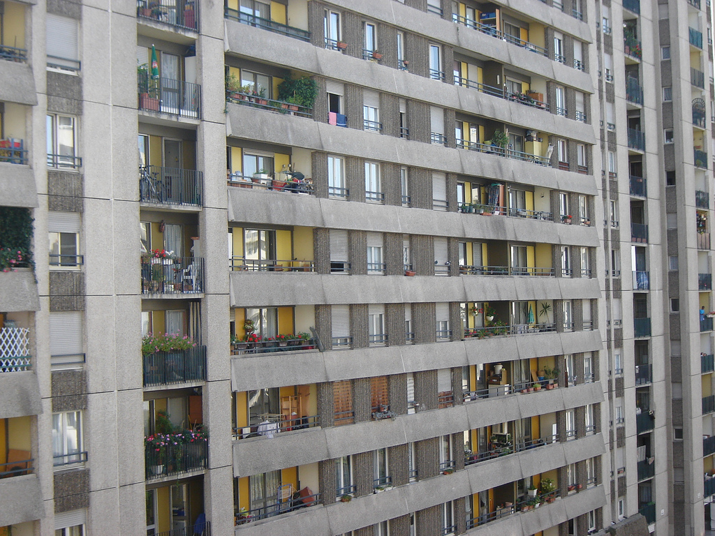 Immeuble à Boulogne-Billancourt (Hauts-de-Seine, Île-de-France, France).Immeuble